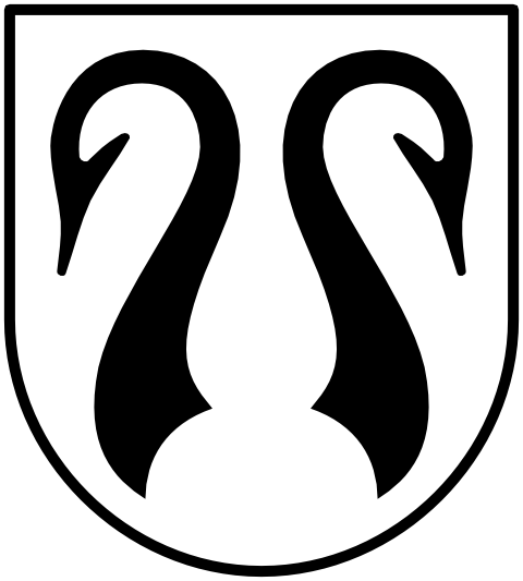 Wappen des Bezirks Dorneck Andere Versionen: SVG auf Anfrage 16:13, 26. Sep 2004 Stw 480 x 533 (30796 Byte) (Wappen des Bezirks Dorneck (Bezirk) )